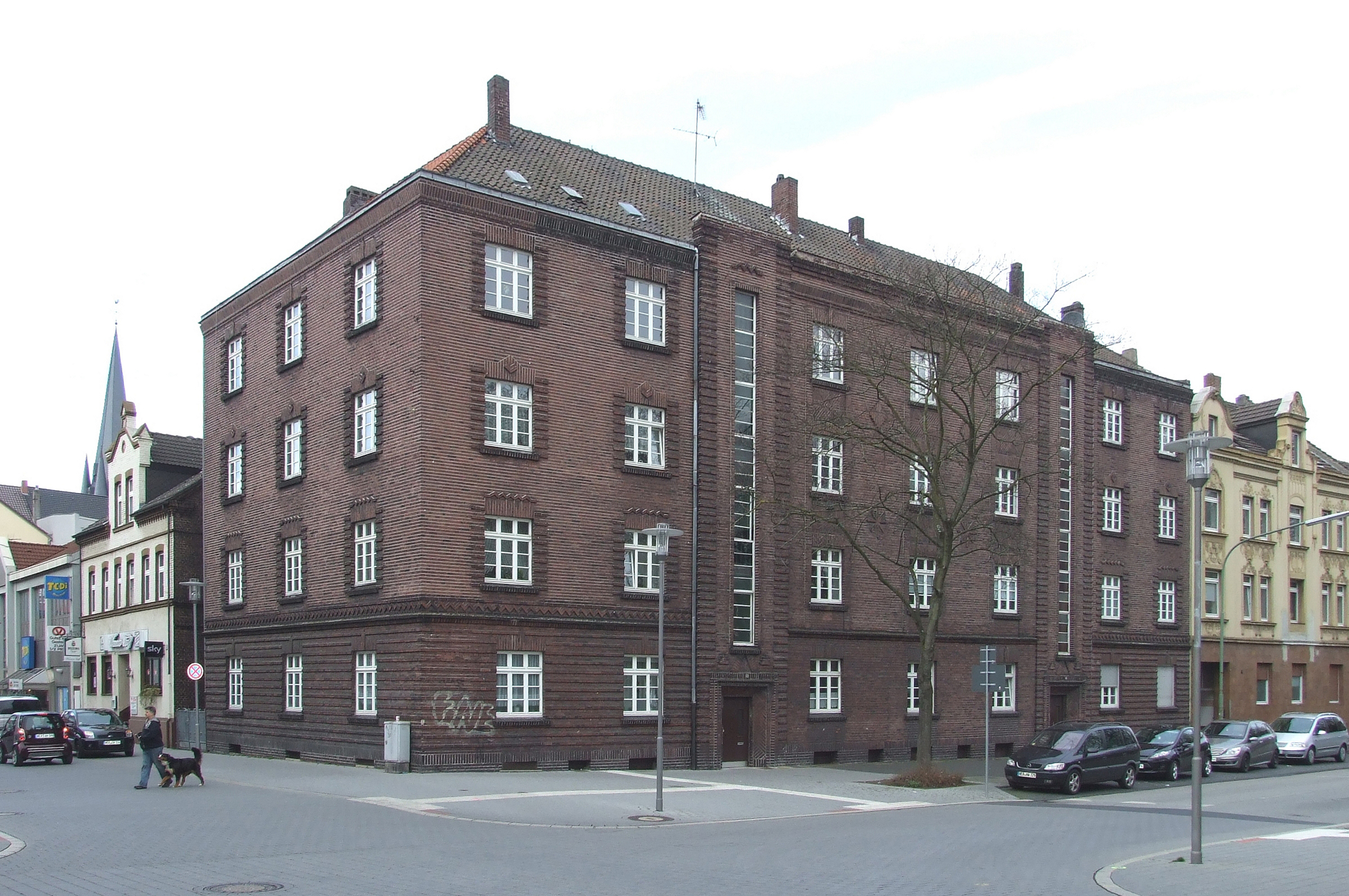 Herne, Wibbeltstraße 5-6 von Südosten